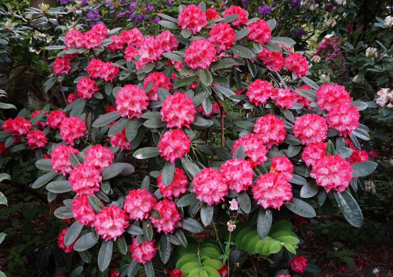 Rhododendron Rendezvous